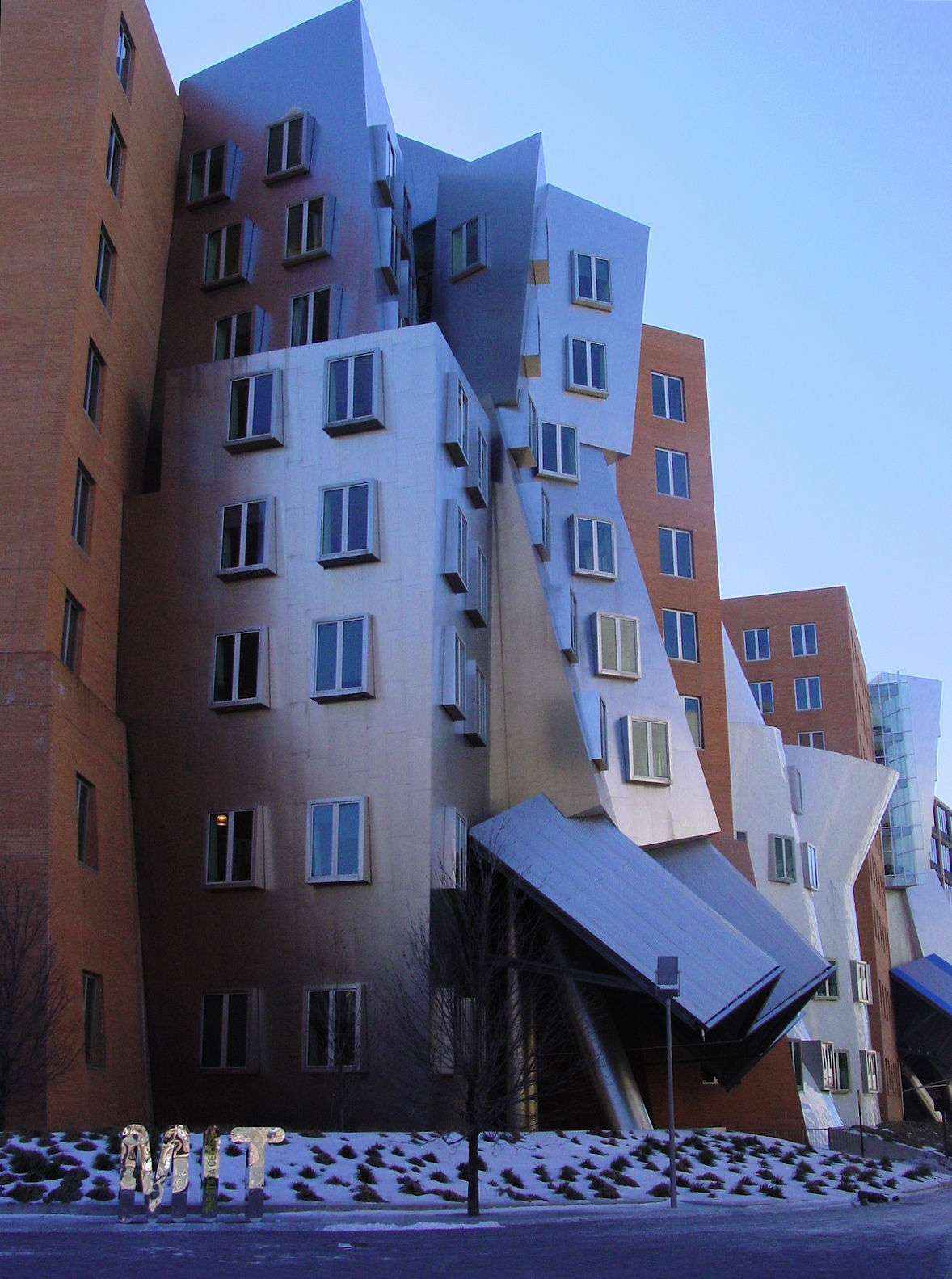 MIT Stata Center